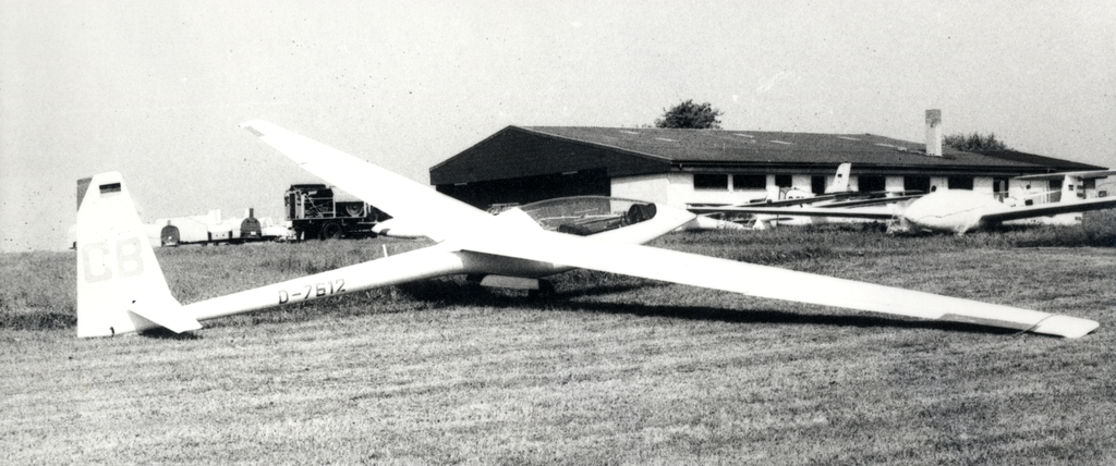 Doppelsitzer Akaflieg Berlin B12 mit dem ursprünglichen Kreuzleitwerk